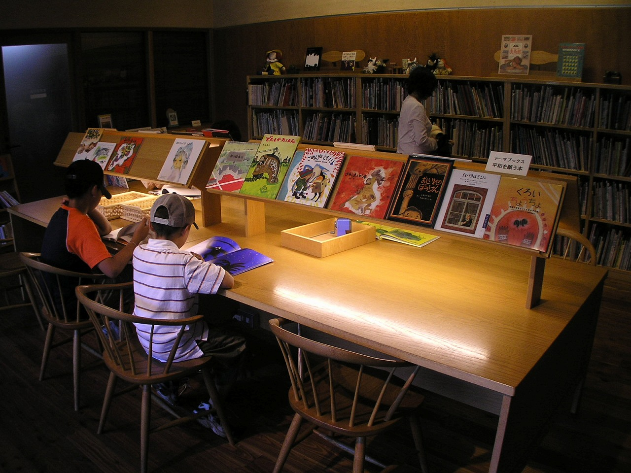 「絵本の部屋」には、コレクション作家を中心に、国内外の絵本約3000冊が並んでいます。